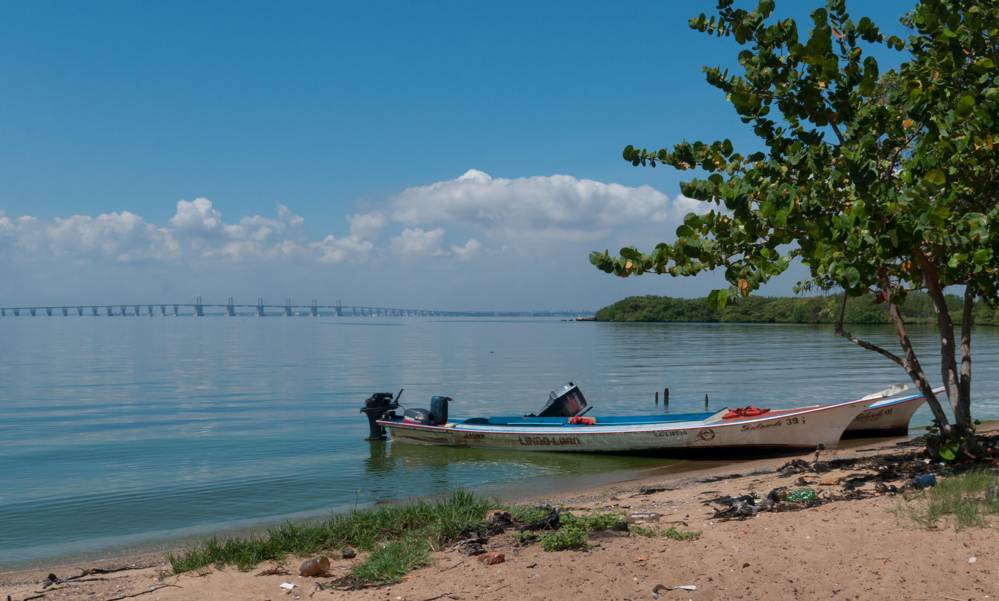 Isla Providencia, al fondo Puente Rafael Urdaneta